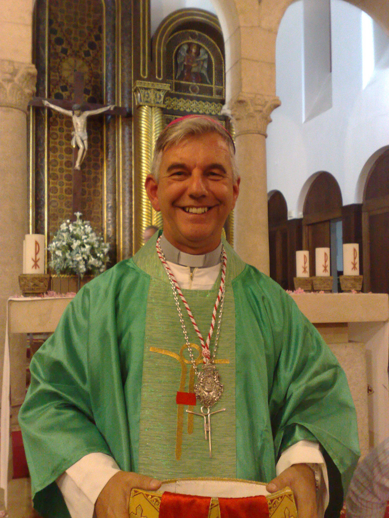 En la Iglesia de San Julian de Somio, Gijón